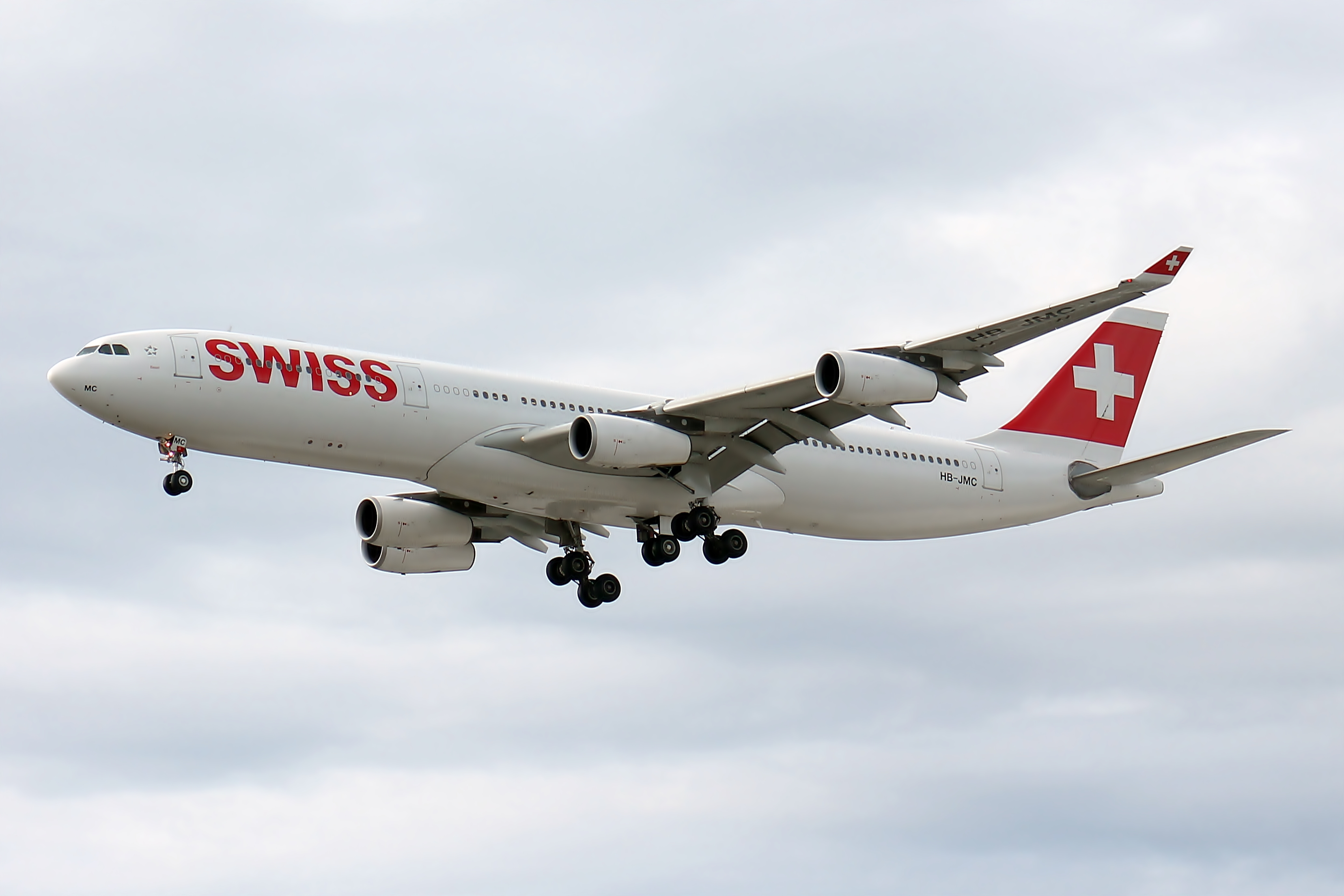 A340-300 SWISS SBGR